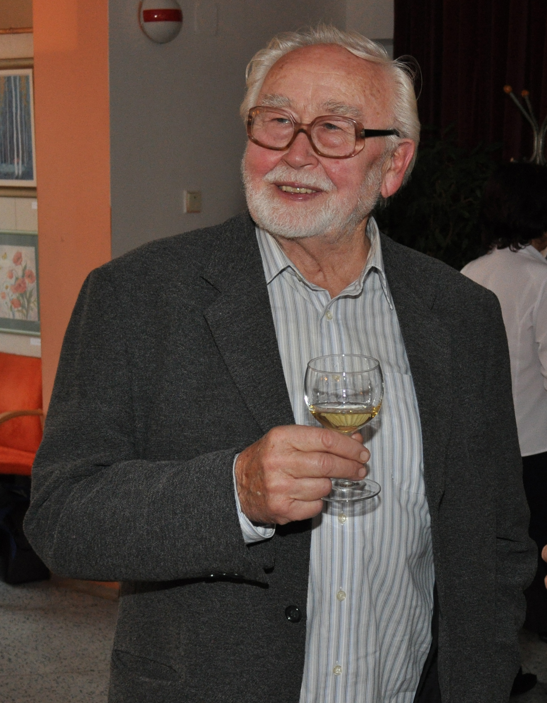 Portrét Otakar Čemus